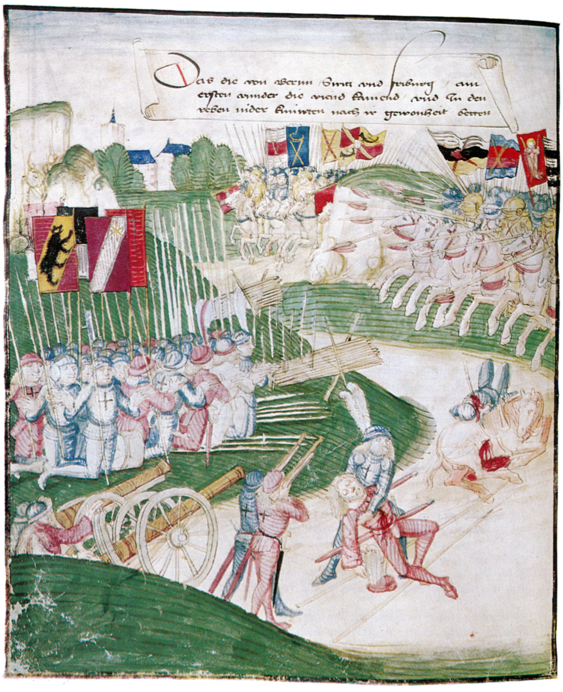 Die eidgenössischen Truppen (links unter den Fahnen von Bern, Freiburg, Thun und Schwyz) beten vor der Schlacht bei Grandson am 2. März 1476. Rechts die burgundische Reiterei im Ansturm. Amtliche Berner Chronik, Bd. 3, S. 644